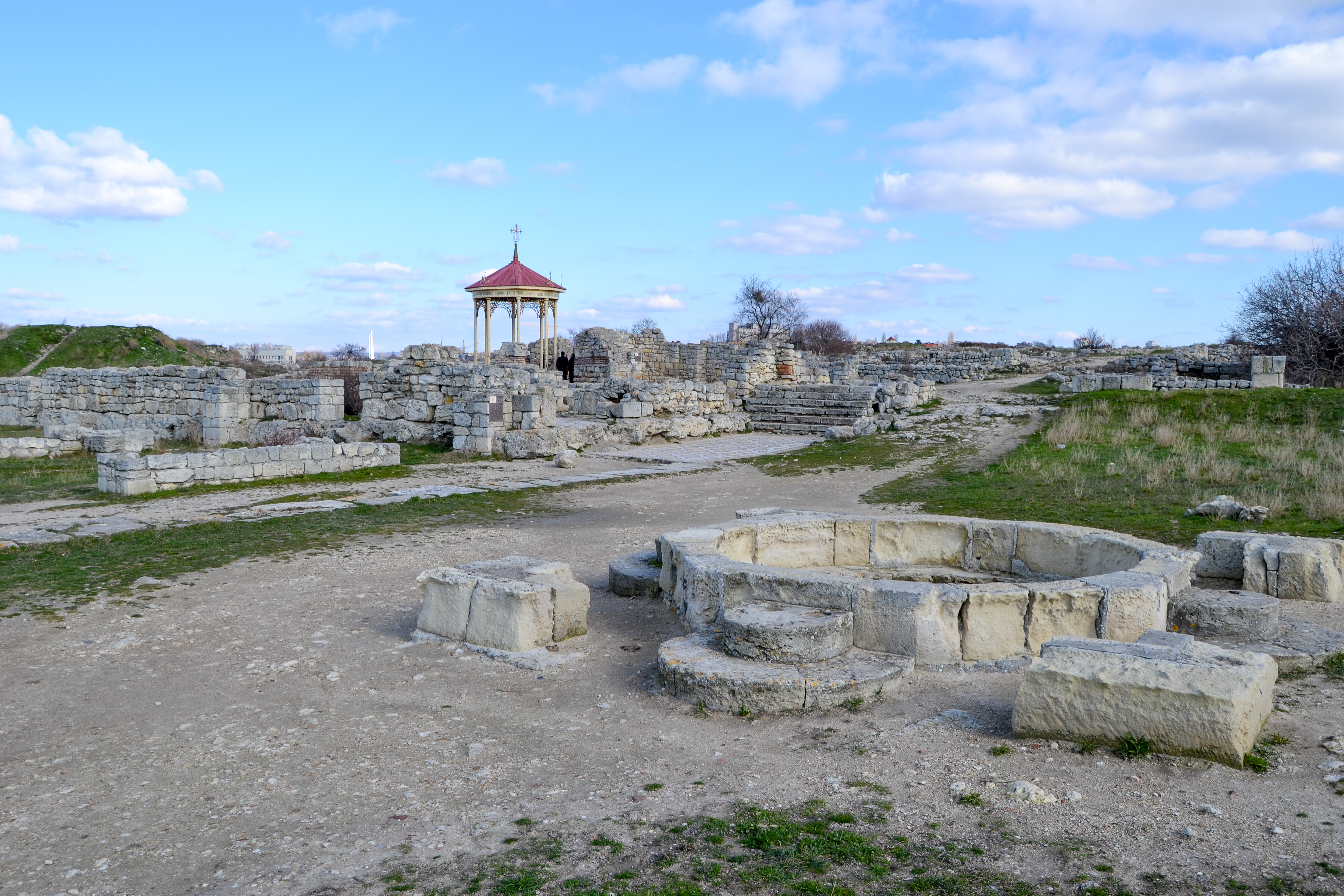 Візантійська церква («Уваровська базиліка») з оточуючими приміщеннями, Севастополь, вул. Древня, 1